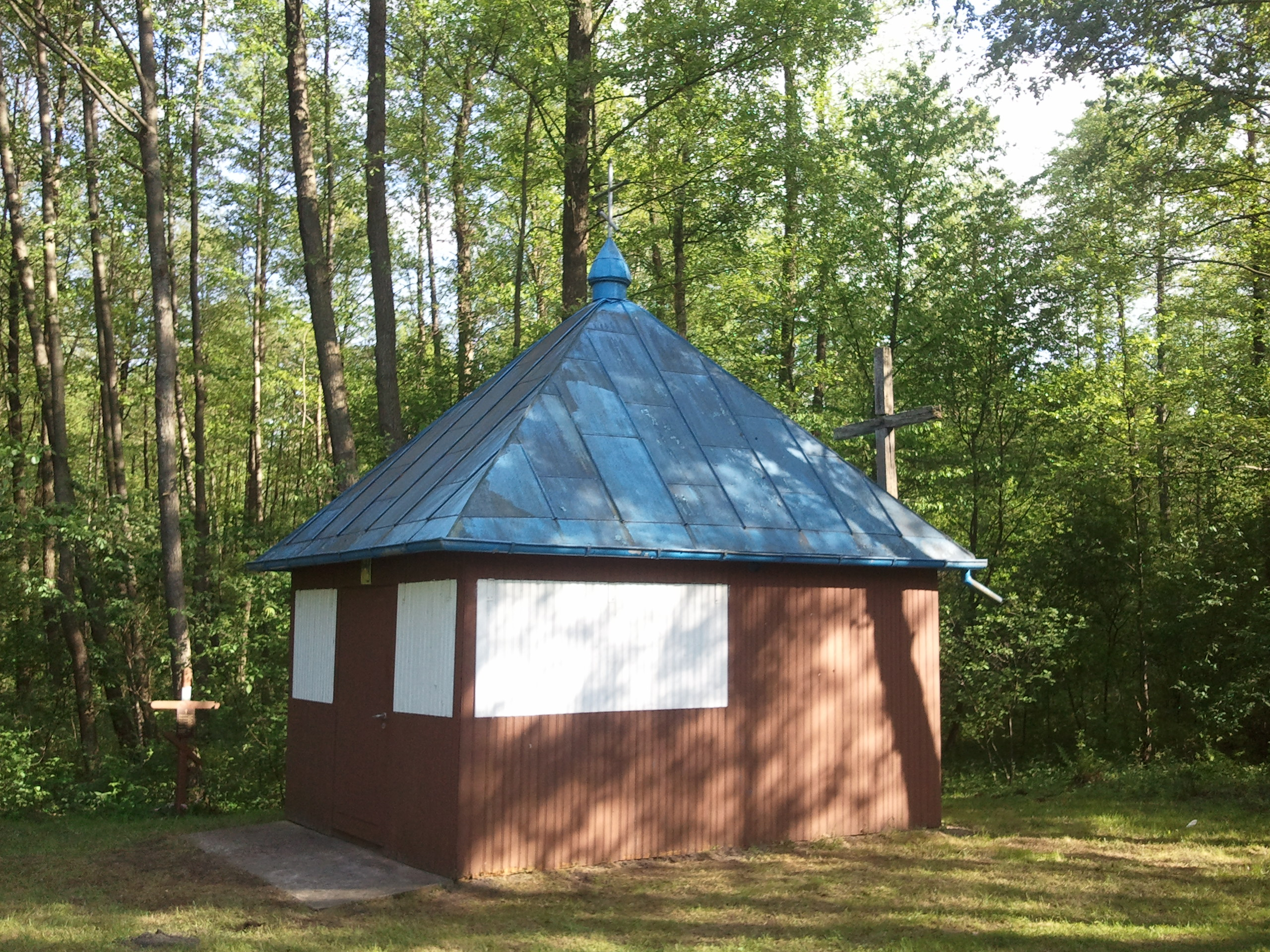 Krasna Wieś